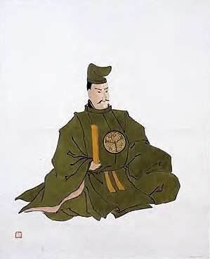 松平忠輝の肖像。